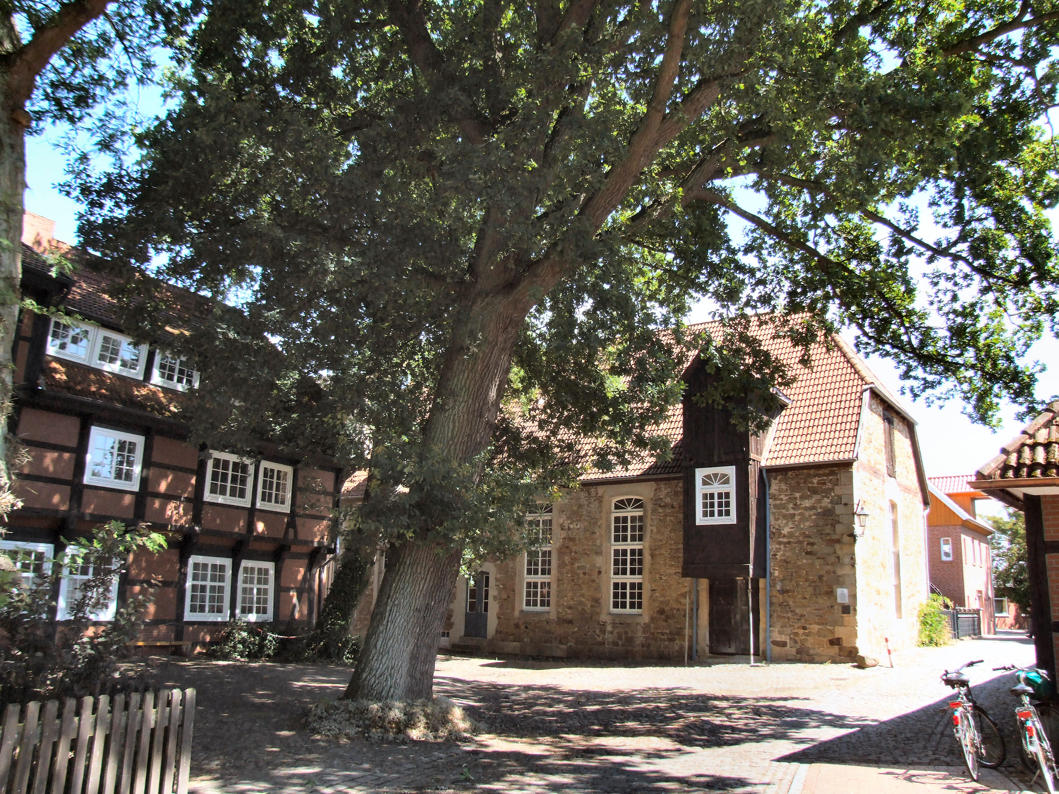 Quakenbrück, rechts Große Mühle, links Burgmannshof (Grothaus'scher Hof, v. Smerten seit 1279 Dienstmannen)